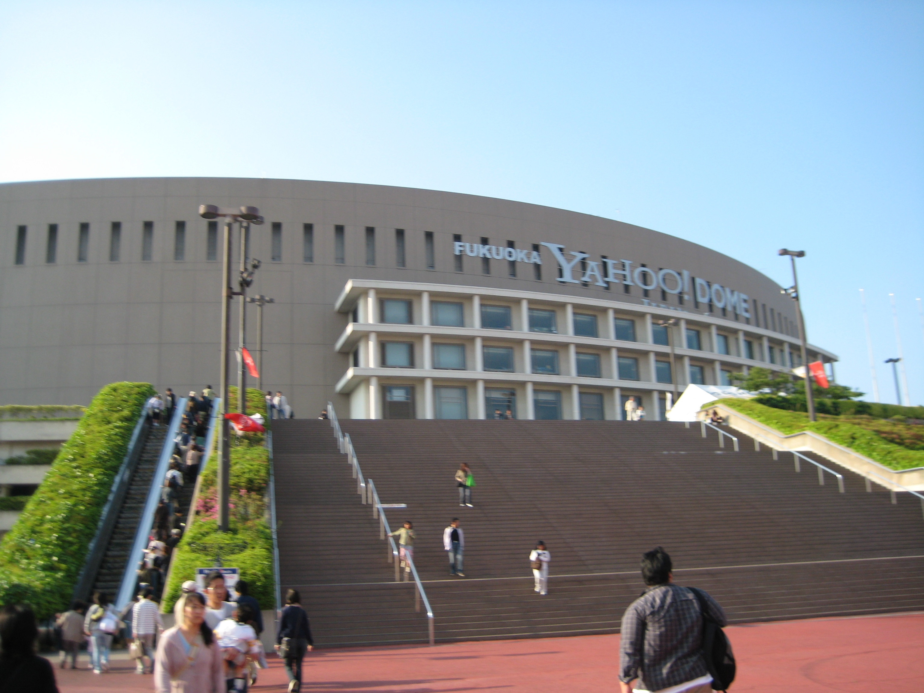 ヤフードーム-Fukuoka Yahoo! Japan Dome